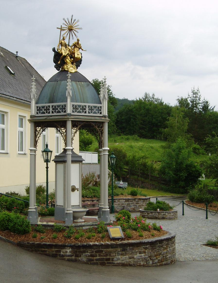 Foto vom 22.Juni 2005 von mir selbst.